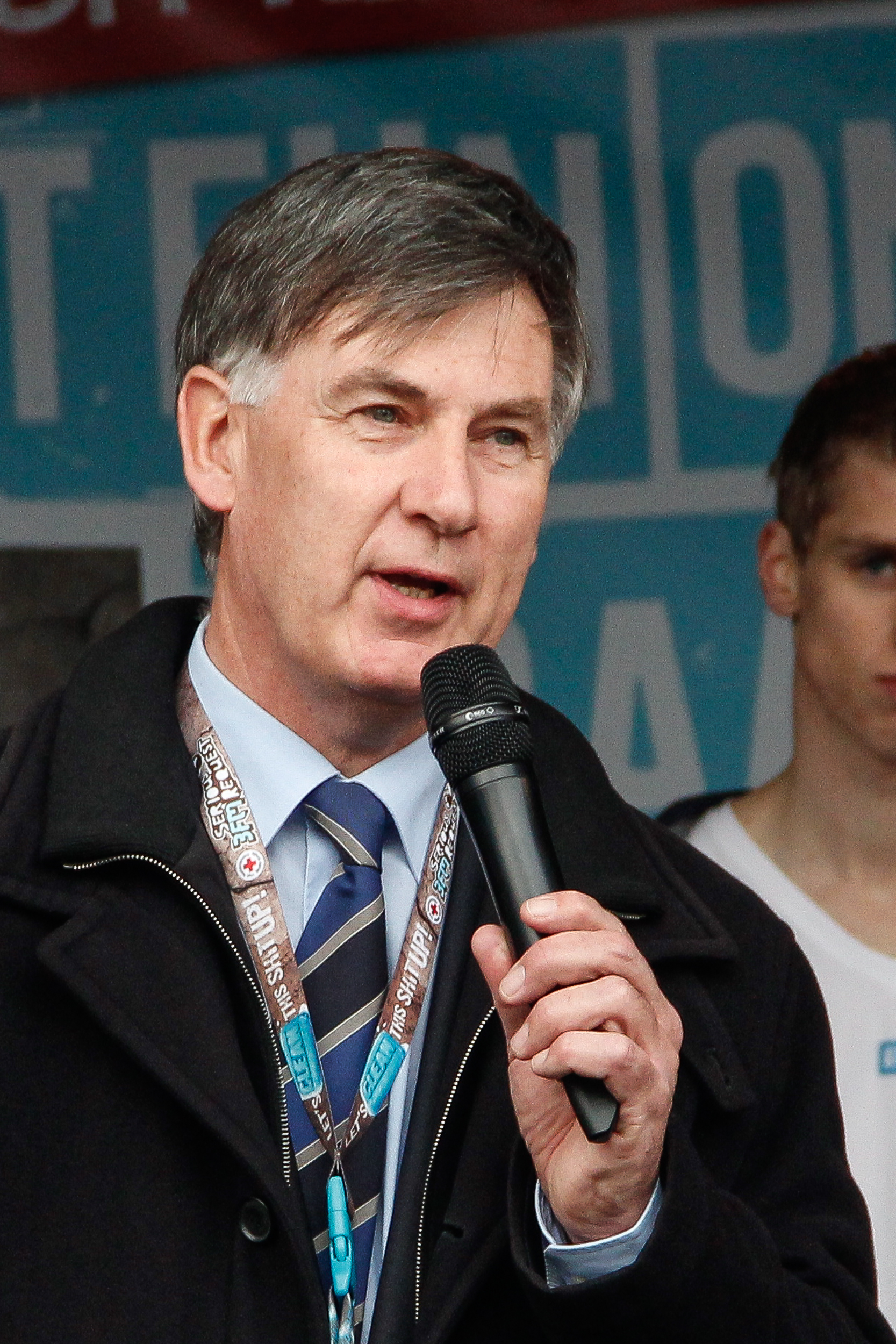 Burgemeester Cees Bijl van Emmen tijdens de opening van het Glazen Huis Emmen 2013